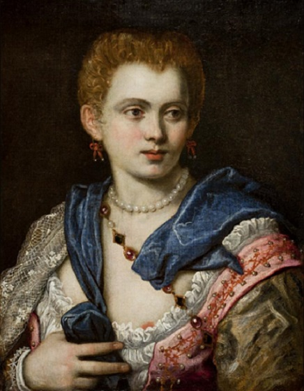 Possibly Veronica Franco